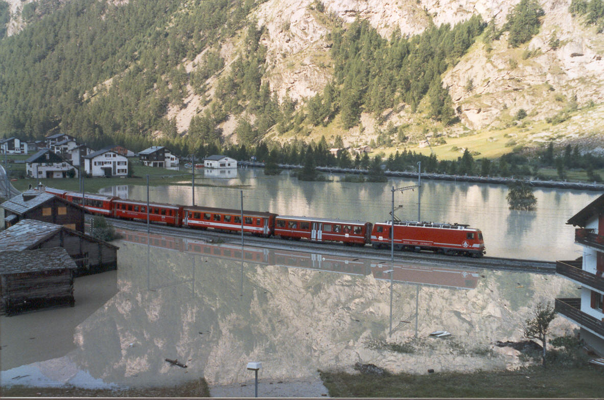 Am Morgen des 10.08.1991 war das Wasser in Randa so weit zurückgegangen, dass der Zugsverkehr wieder aufgenommen werden konnte. Hier der Glacier-Express.